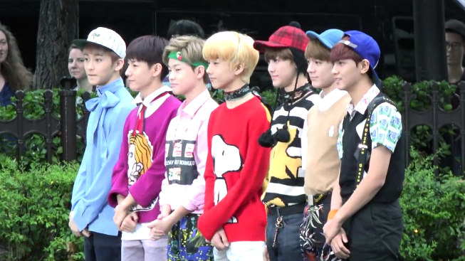 2016년 8월 26일 뮤직뱅크에서 NCT DREAM